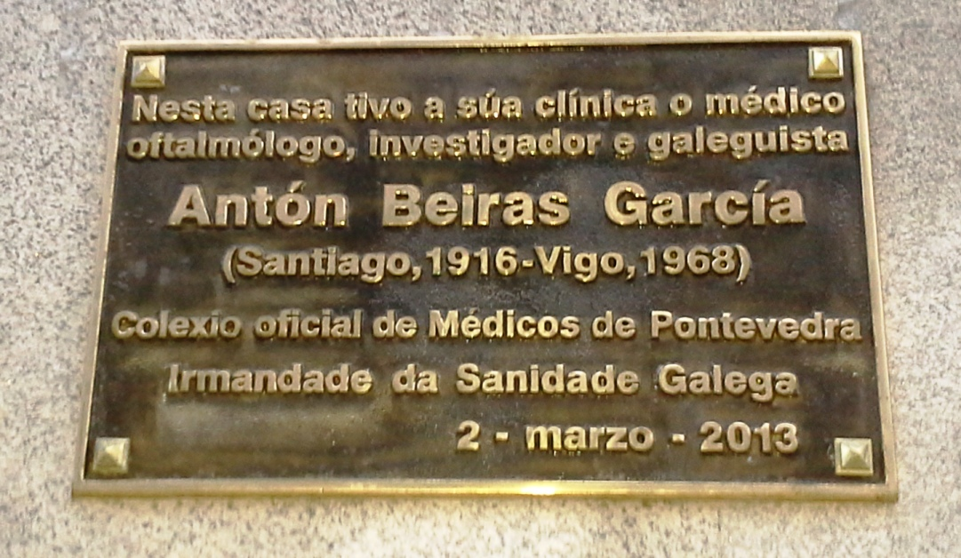 Vexa o título e as categorías